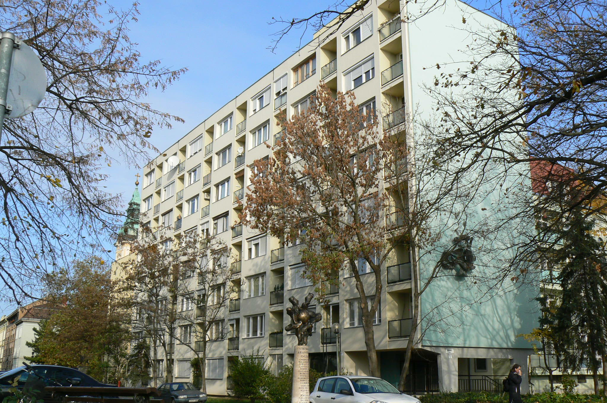 Sellőház, Szeged, Korányi rakpart, homlokzatán a névadó Sellő: Makrisz Agamemnon szobrászművész munkája. Az épületet tervezte Borvendég Béla 1961.